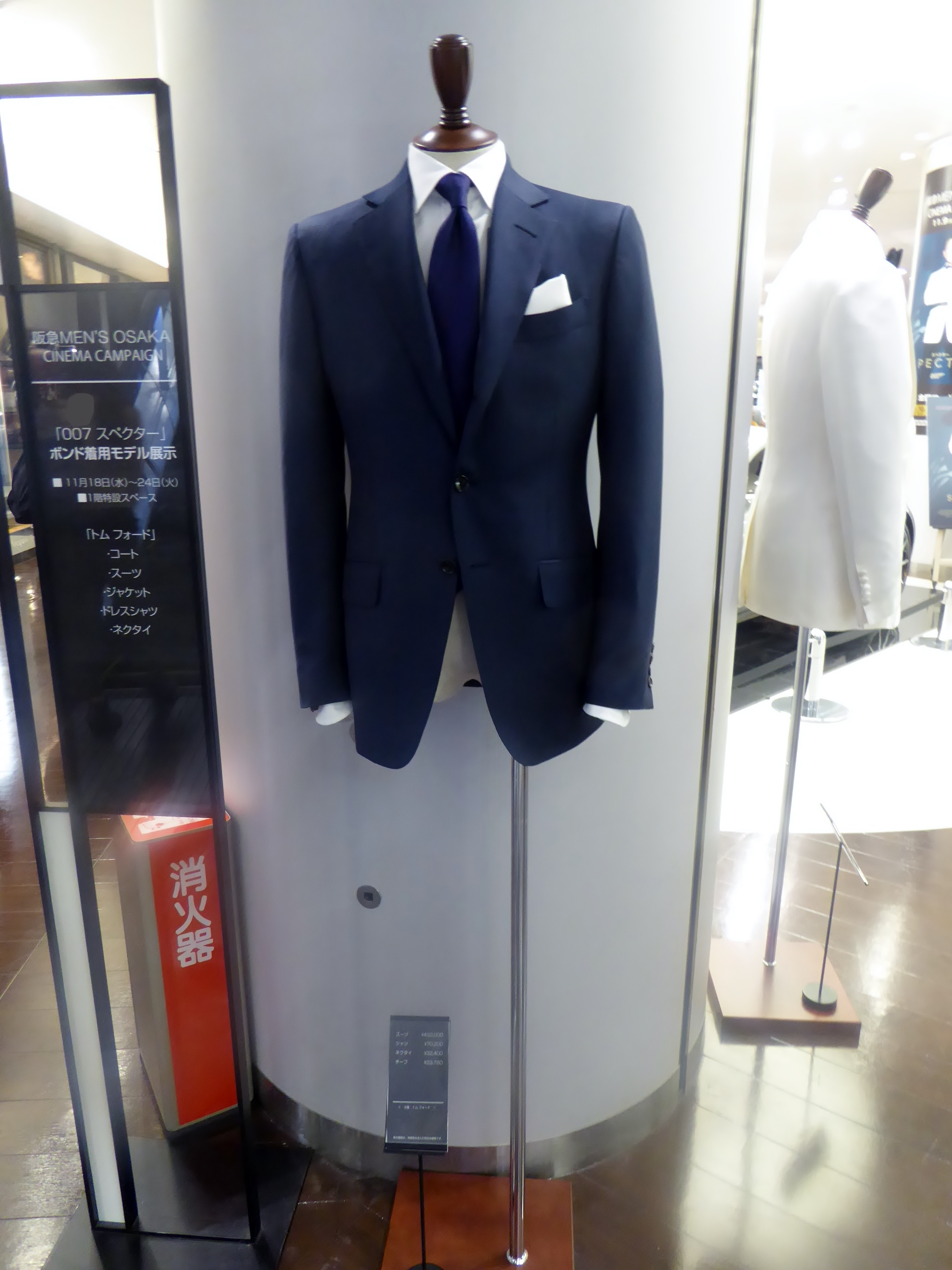 「007 スペクター」においてジェームズ・ボンドが着用した仕様の服を撮影。